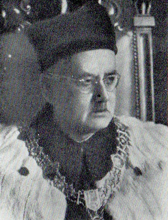 Profesor UAM.